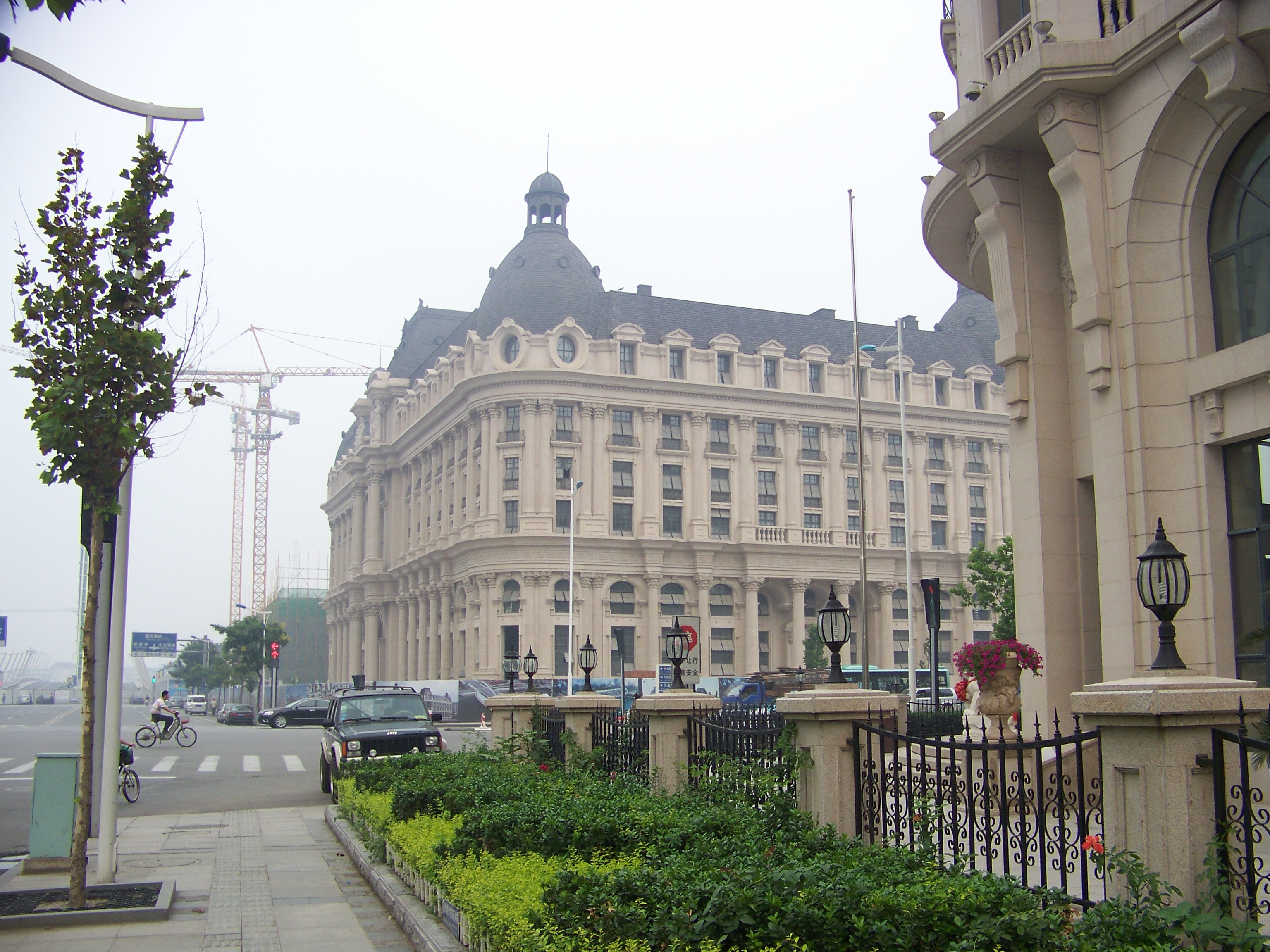 天津市商委大楼